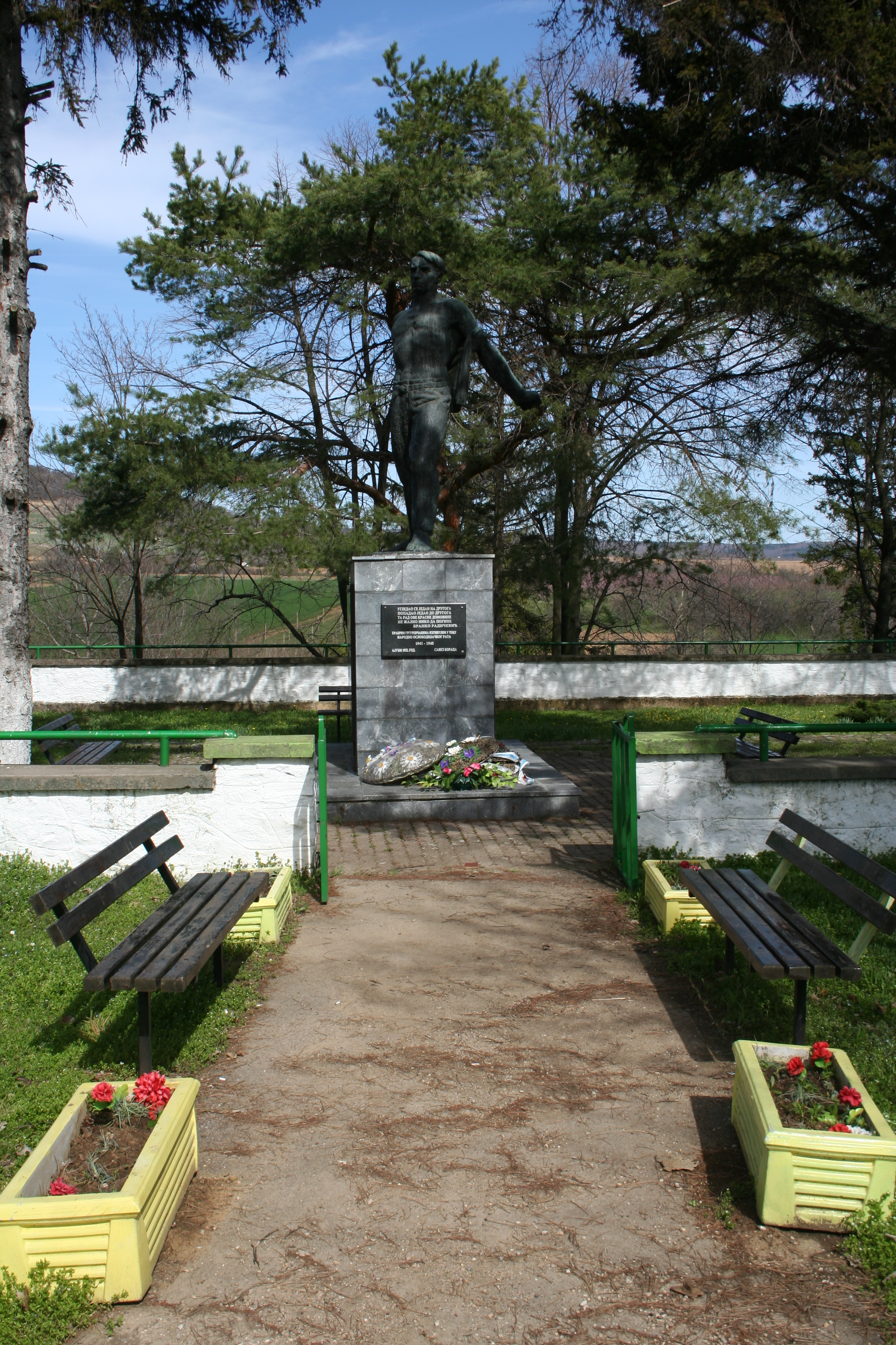 Grgurevci